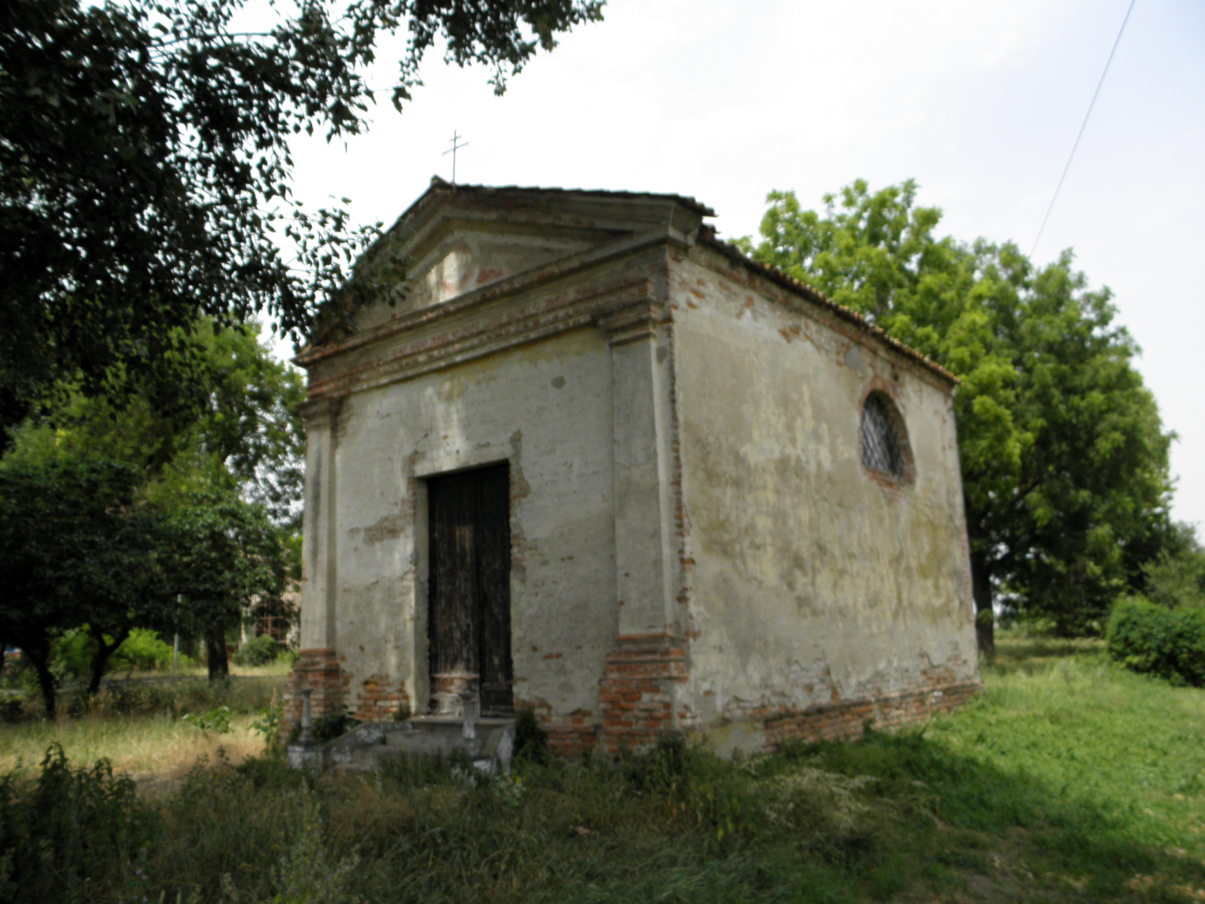 Pozzonovo, località Capolcastro: la cappella gentilizia di Villa Capolcastro Centanini.